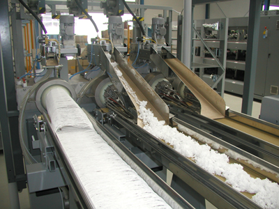 Garnauflage beim Power-Heat-Set-Verfahren